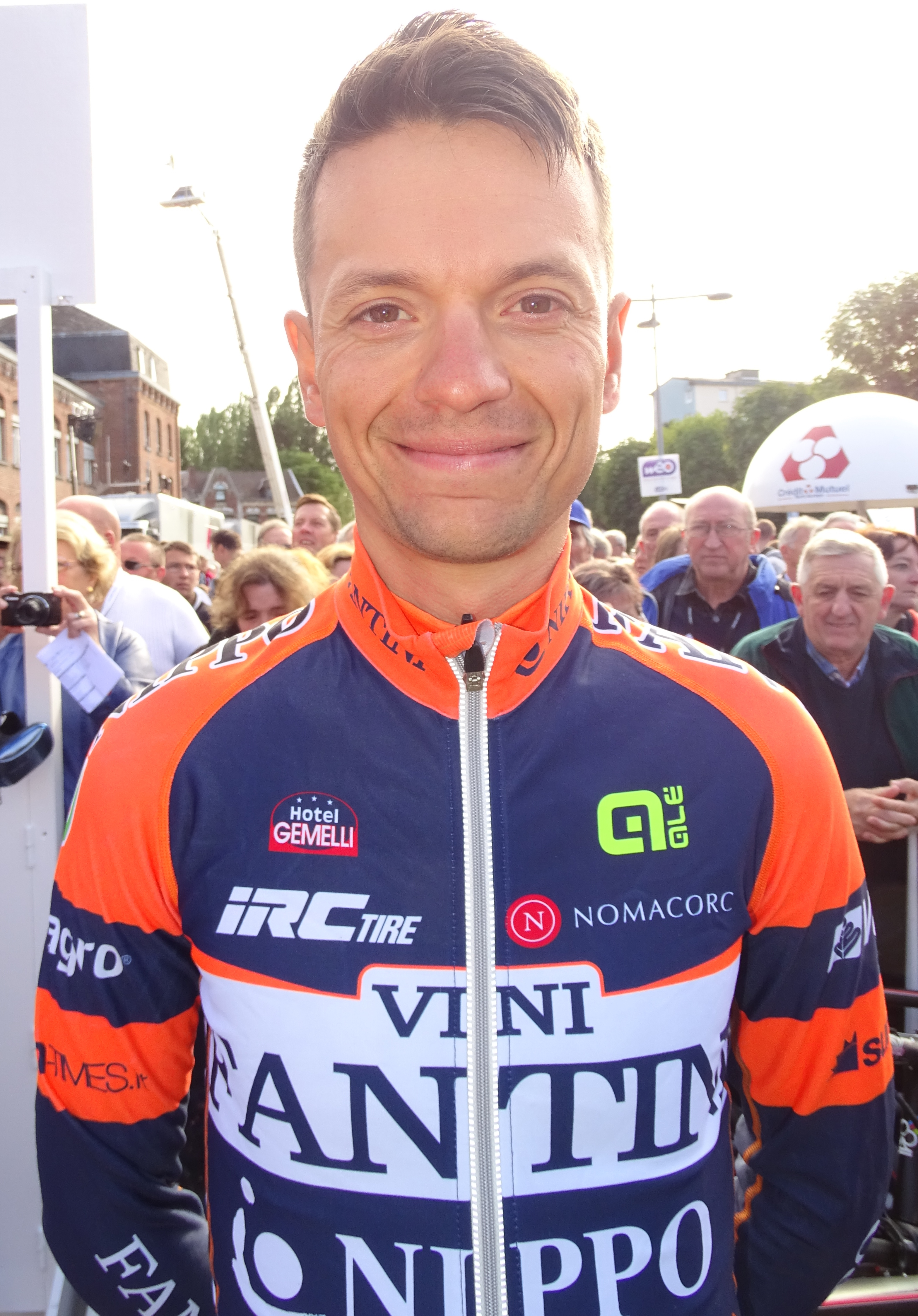 Reportage réalisé le dimanche 6 septembre à l'occasion du départ et de l'arrivée du Grand Prix de Fourmies 2015 à Fourmies, Nord-Pas-de-Calais, France.